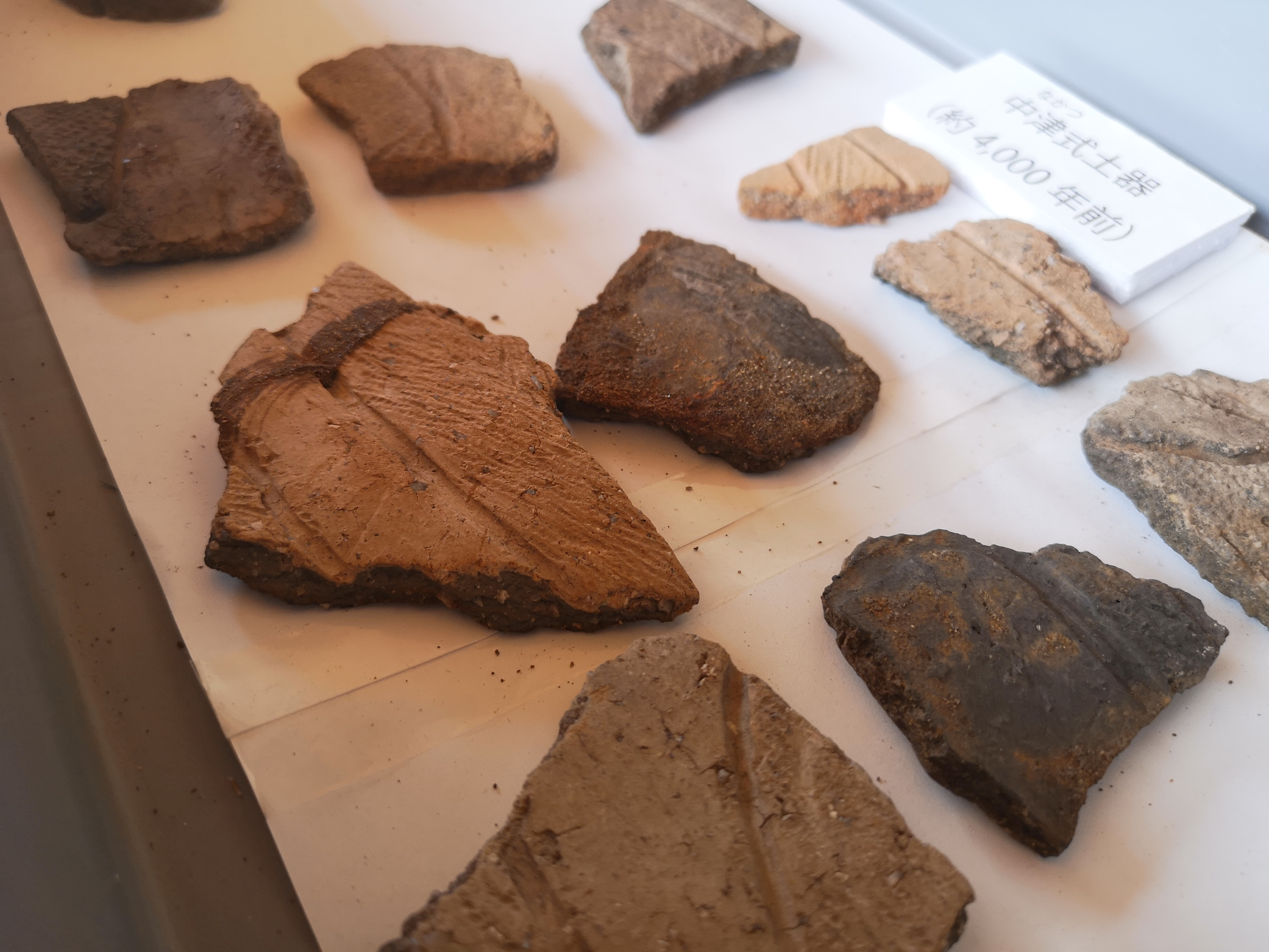 京丹後市網野町浜詰に所在する縄文遺跡「浜詰遺跡」で2019年８月31日に行われた発掘調査見学会で公開された。同志社大学の調査による出土物。